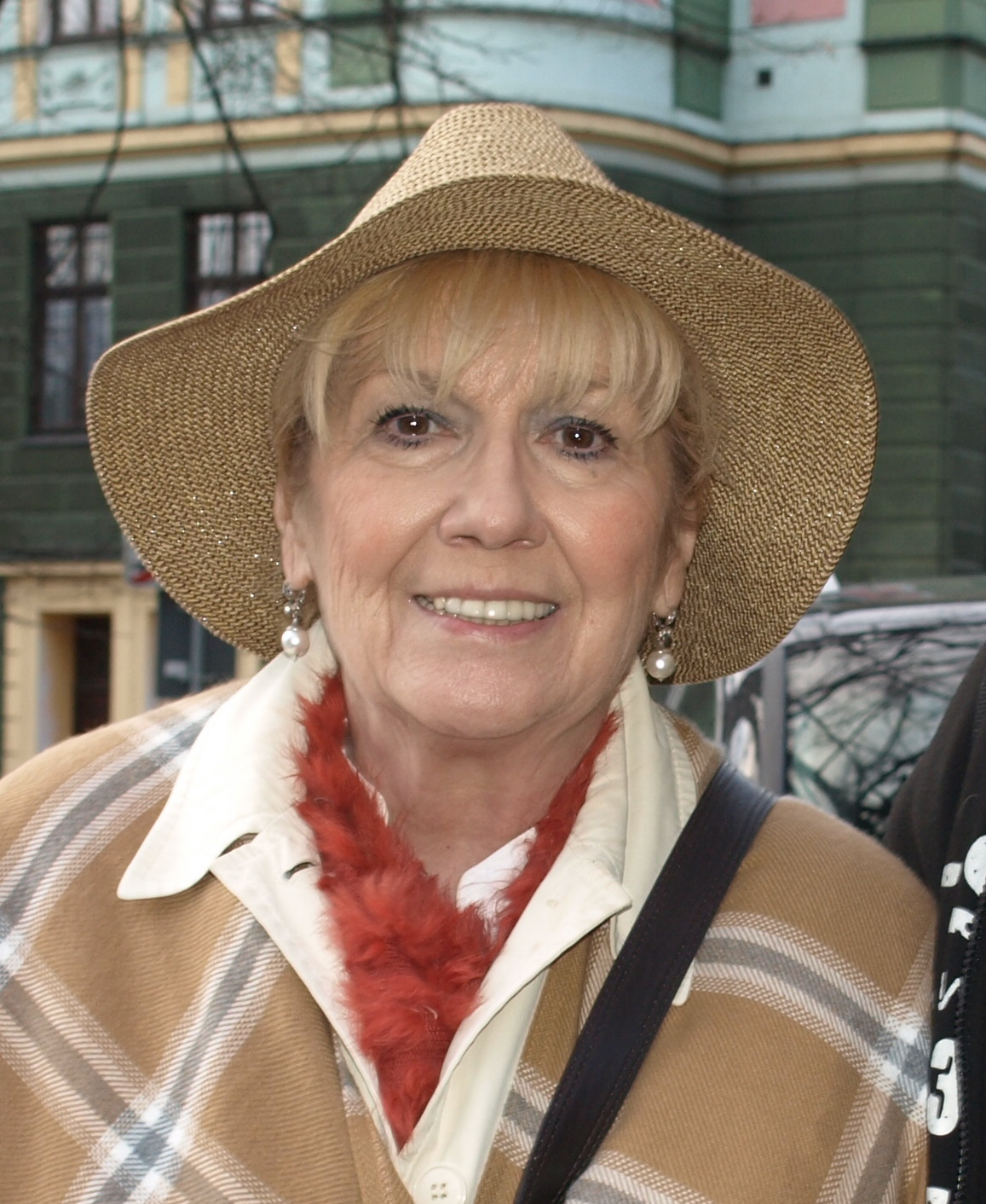 Emilia Krakowska